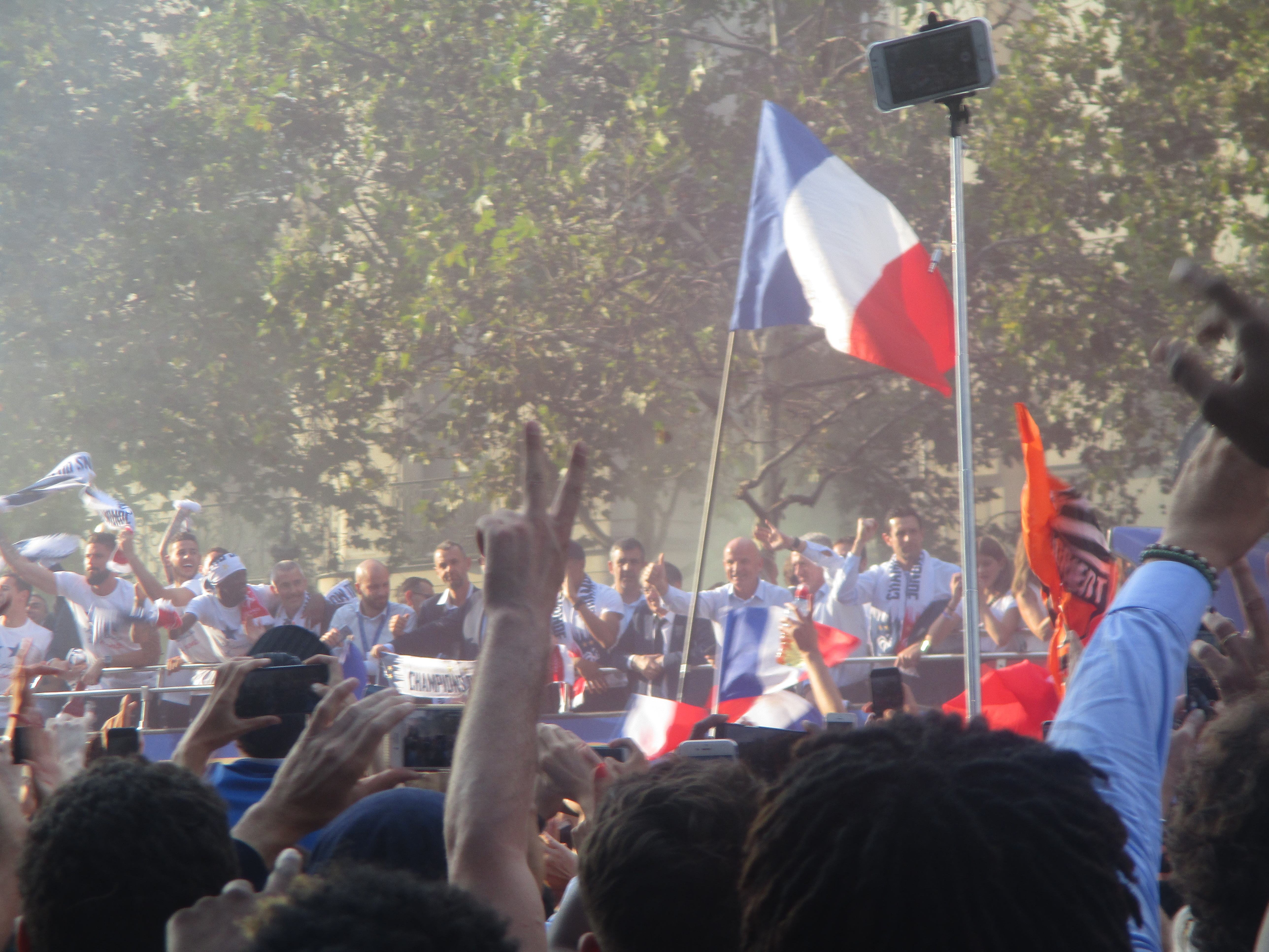 Les bleus victorieux descendent les Champs-Élysées. 16 juillet 2018.